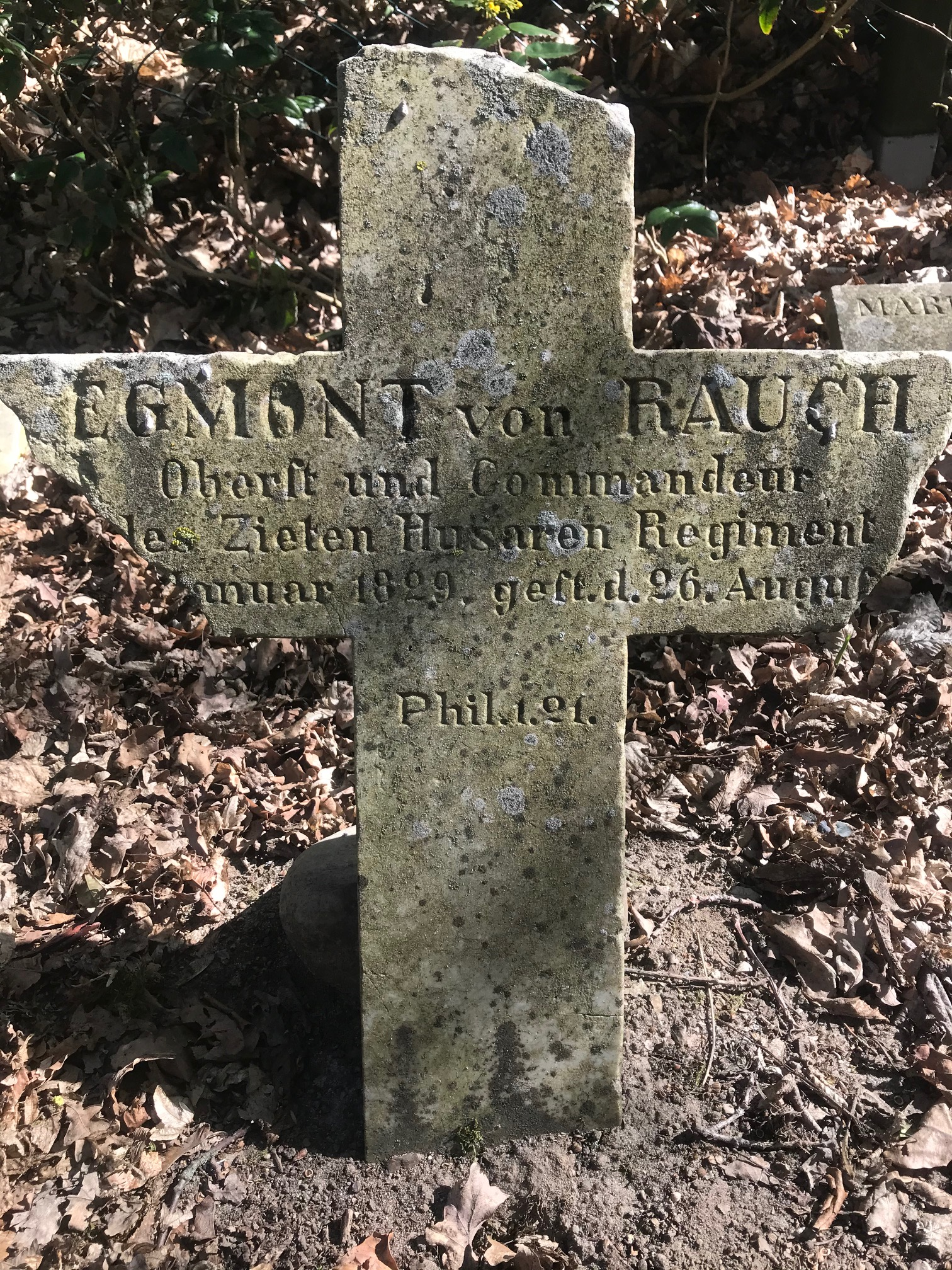 Grab von Oberst Egmont von Rauch im Dahlener Erbbegräbnis der Familie von Schiestädt